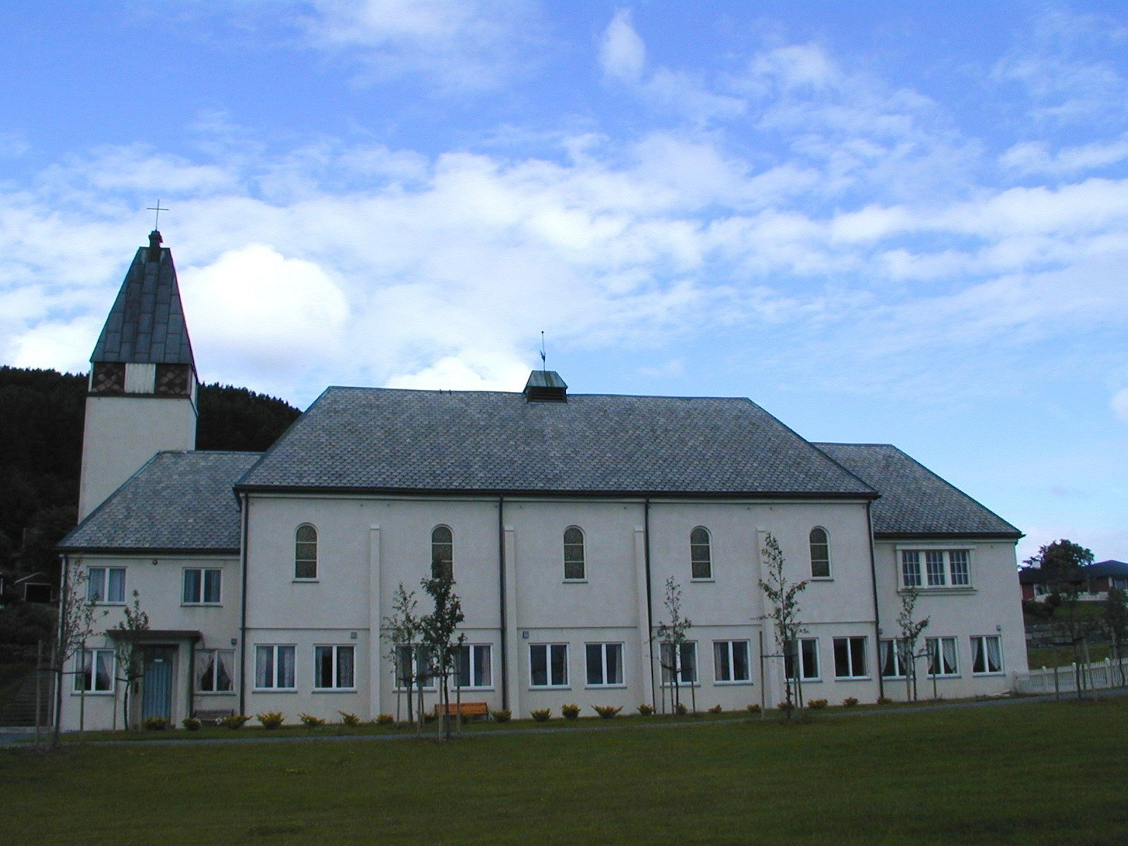 Valderøy kirke. Foto: Max Ingar Mørk, fra Riksantikvarens Kulturminnesøk.